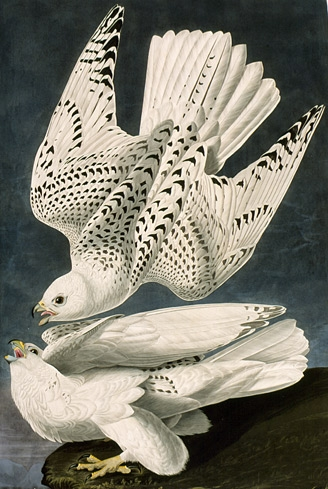 Falco rusticolus